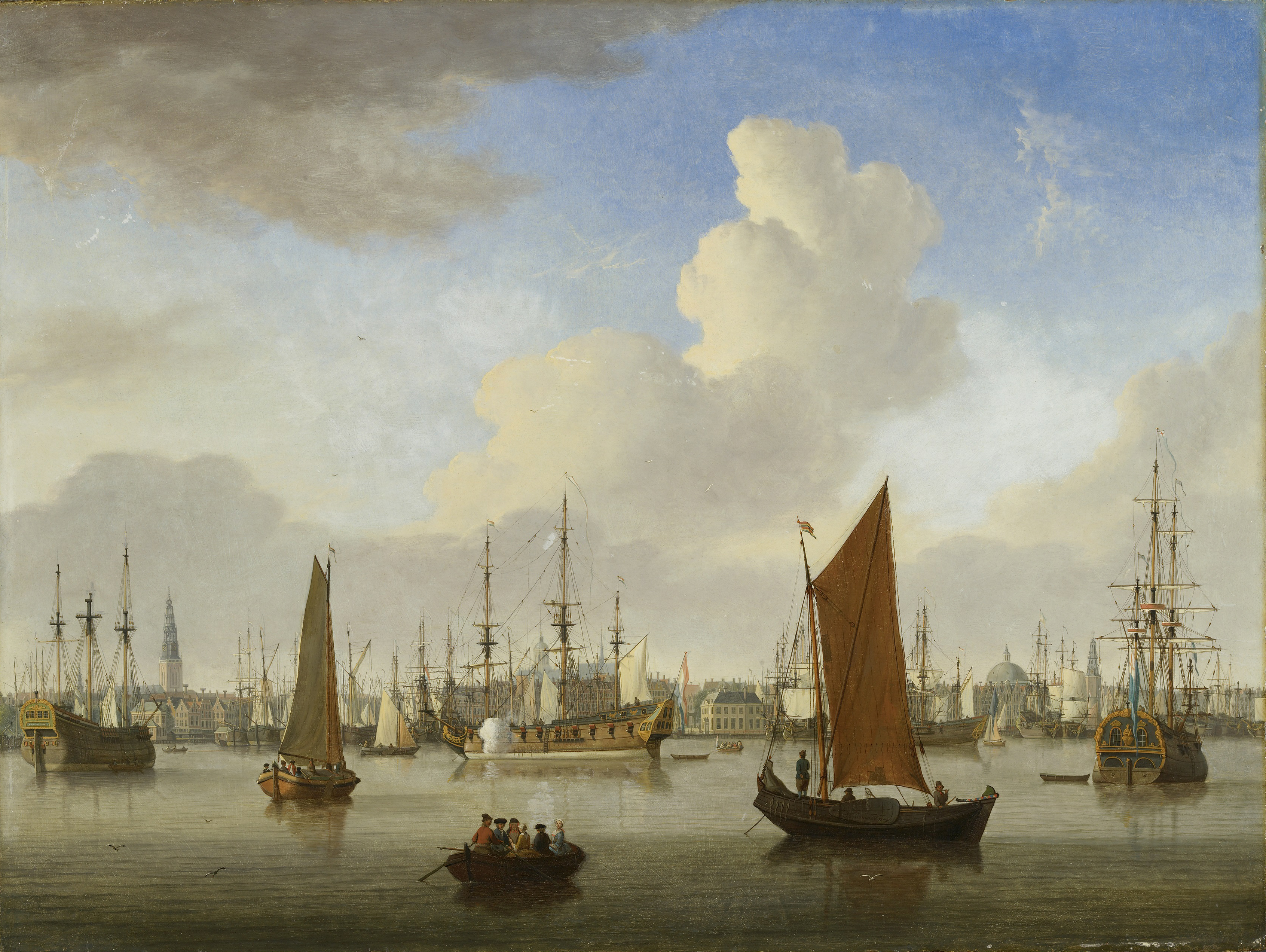 Landscape; stadsgezicht; stadsgezicht Amsterdam; havengezicht; IJ; Oude Kerk; Paleis op de Dam; Nieuwe Kerk; Nieuwe Stadsherberg; Ronde Lutherse Kerk; Haringpakkerstoren